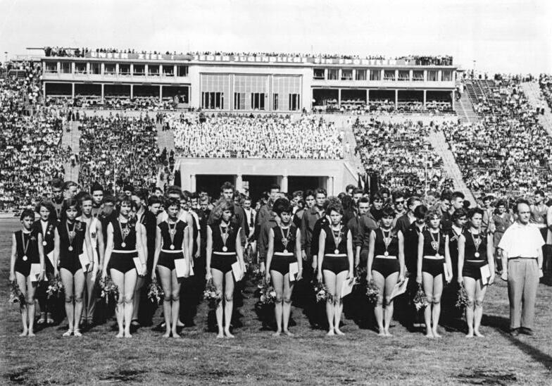 Leipzig, Turn- und Sporttreffen, Siegerehrung Zentralbild Schlegel Son-Noa 21.7.1957 Turn- und Sporttreffen der Jugend in Leipzig. Höhepunkt des Turn- und Sporttreffens der Jugend in Leipzig war die Siegerehrung der jungen Sportlerinnen und Sportler. Karl Namokel sprach zu der Jugend im Zentralstadion. UBz: Einmarsch der besten Sportler zur Siegerehrung.